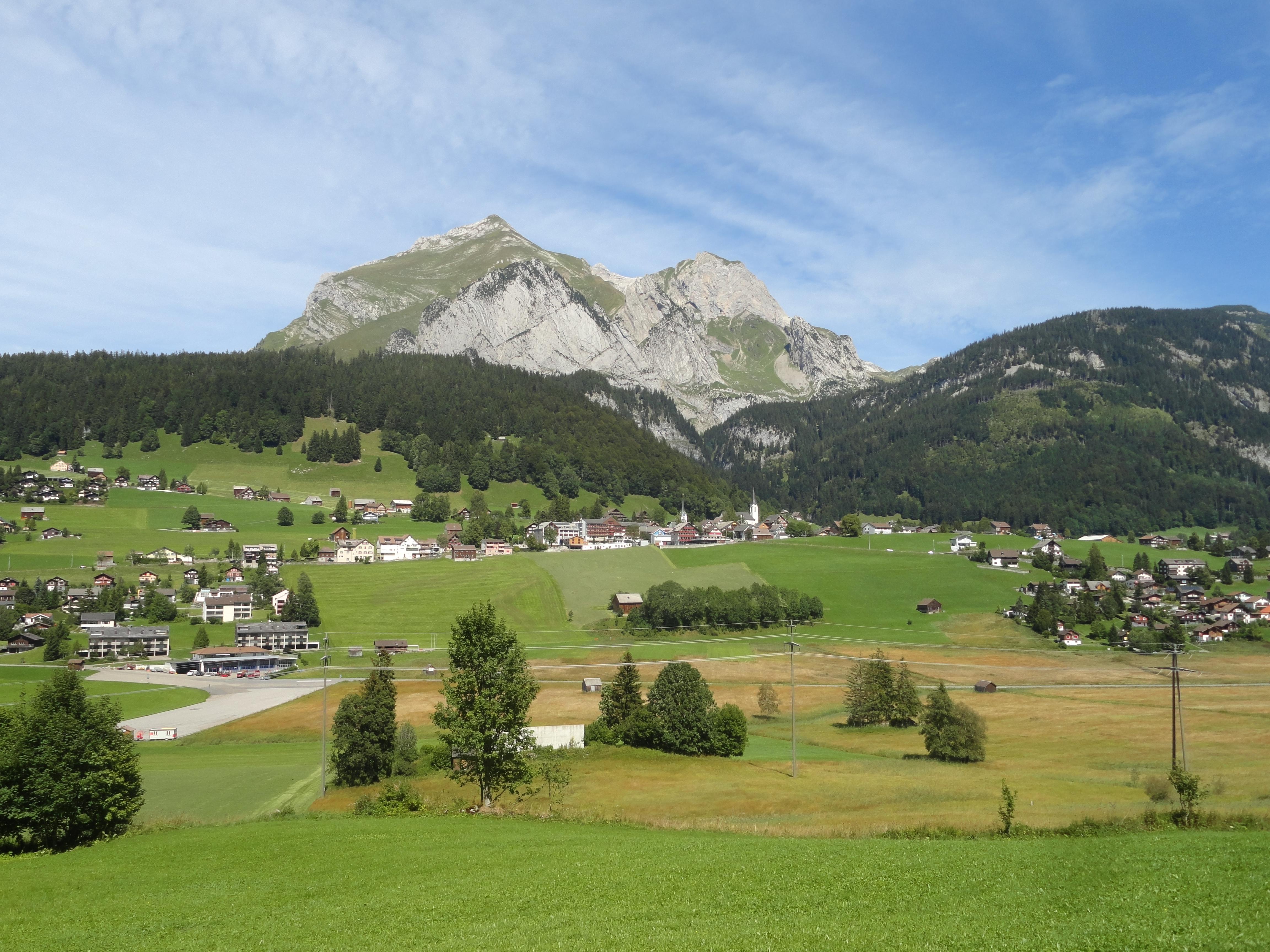 Wildhaus SG